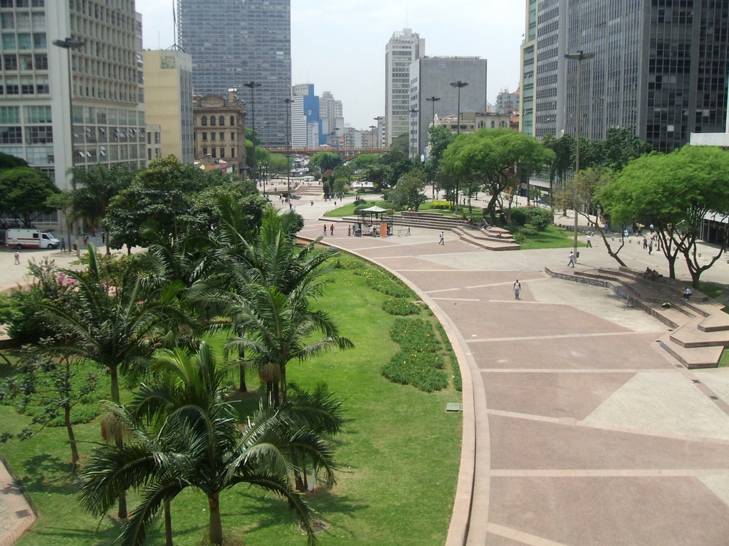 Vale do Anhangabaú, no centro de São Paulo, Brasil